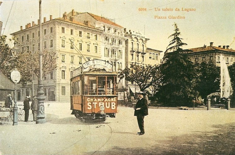 Tram der Strassenbahn Lugano an der Piazza Giardino